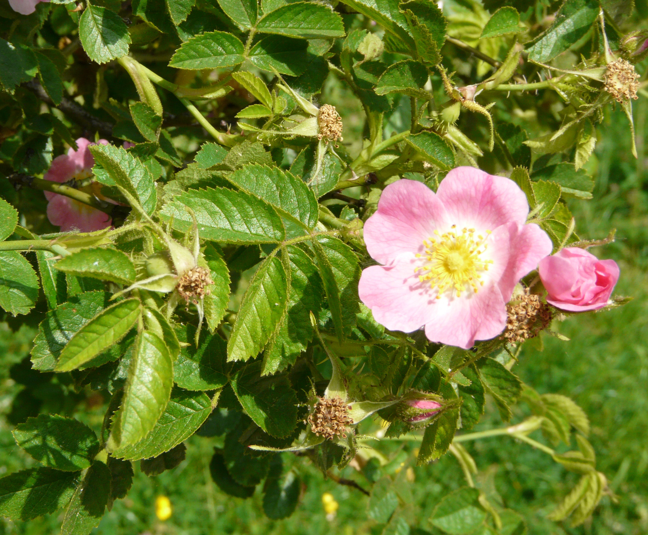 Rosa micrantha